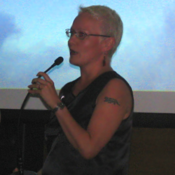 FinnCon 2006 Star Wreck teki tärkeän pelinavauksen kotimaisella scifi-leffojen kentällä, ja samalla linjalla jatketaan tulevaisuudessakin. Tuotantoyhtiö Energian Samuli Torssonen, Timo Vuorensola ja Jarmo Puskala kertovat tulevasta elokuvastaan, Rautataivaasta, ja esittelevät myös elokuvan käsikirjoittajan.